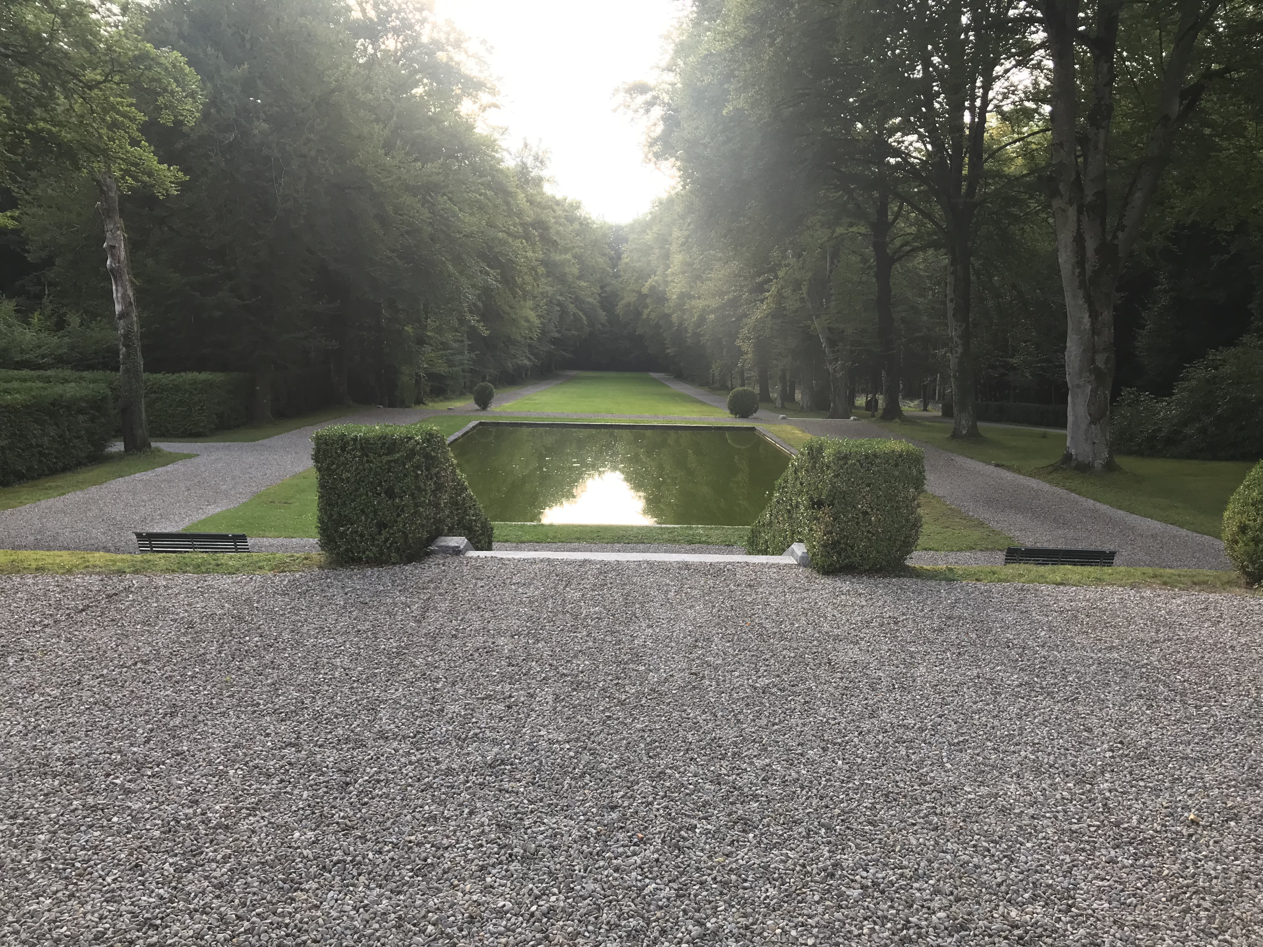 Le Bois-Murat 2019 vue Est